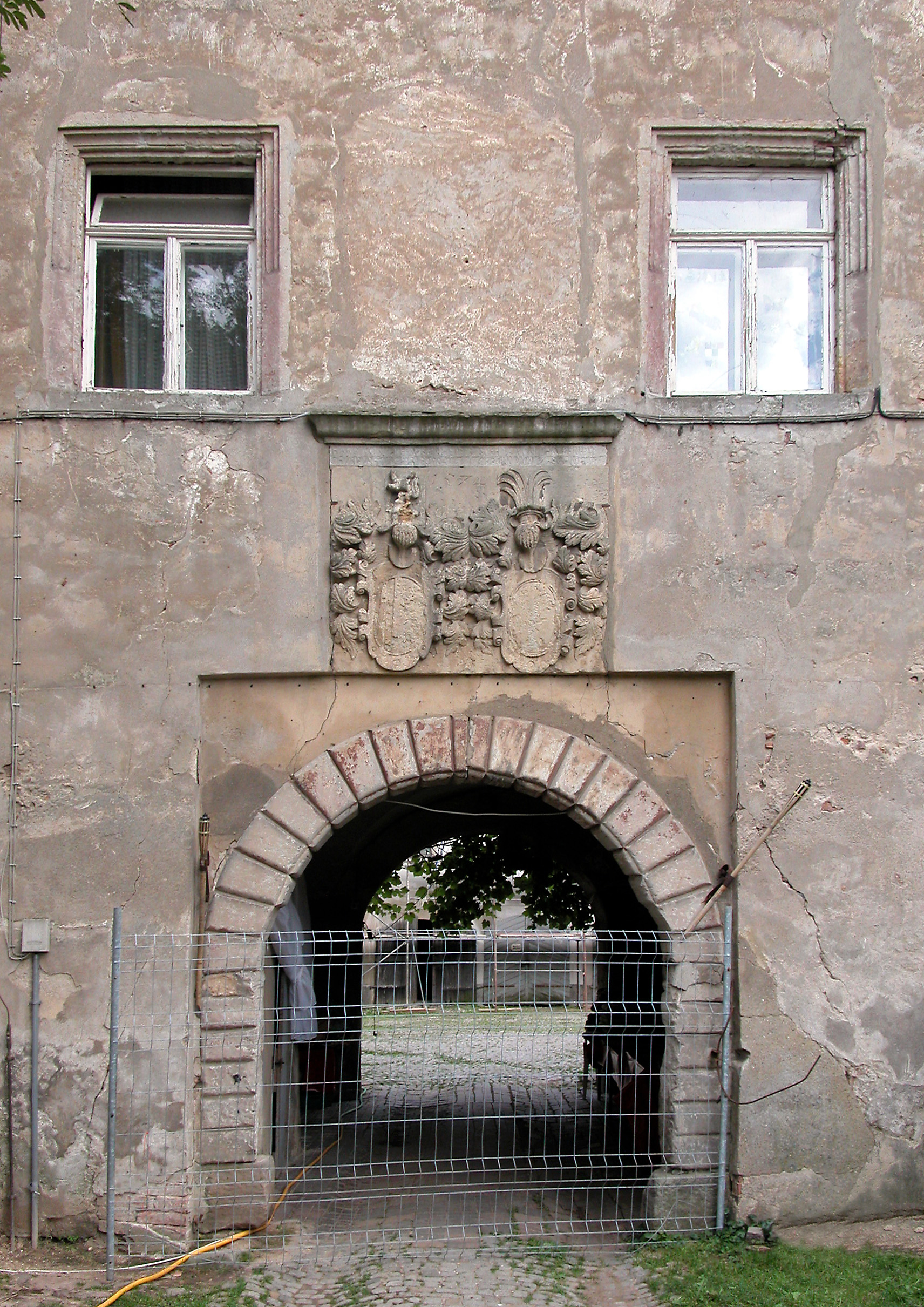 08.08.2006 04749 Noschkowitz (Ostrau): Rittergut, Torhaus des Schlosses von außen. Ursprüngl. Wasserburg 15.-16. Jh. [DSCN11013.JPG]20060808390.DR.JPG(c)Blobelt